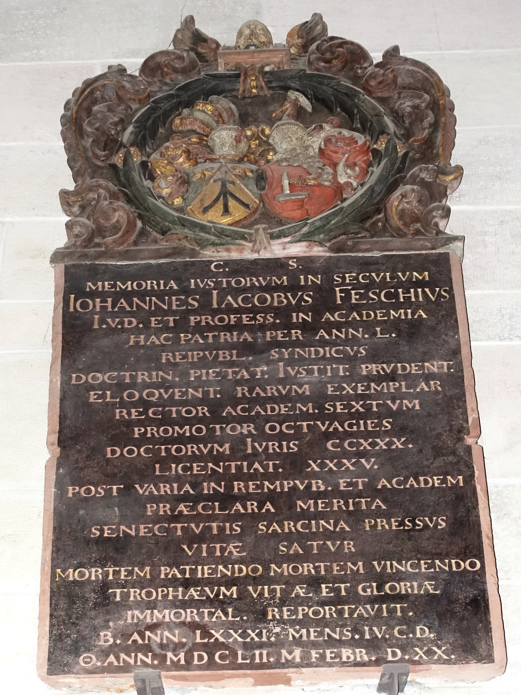 Johann Jakob Fäsch (1752-1832) evangelischer Geistlicher. Epitaph im Basler Münster